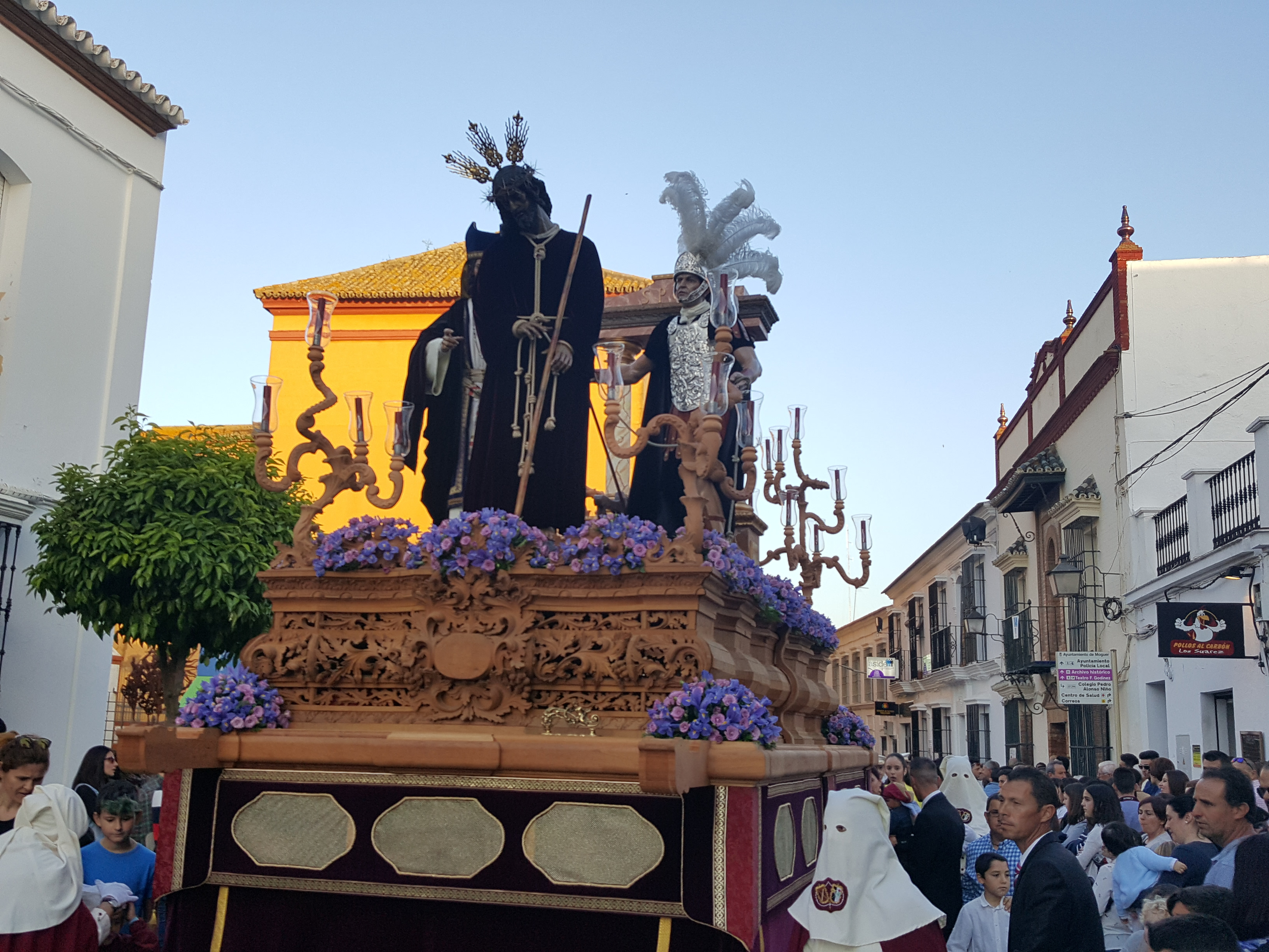 Hermandad del Cristo de los Remedios o del Cautivo. Desfile procesional del Lunes Santo. Vista del paso del Cristo de los Remedios por el casco urbano de Moguer.